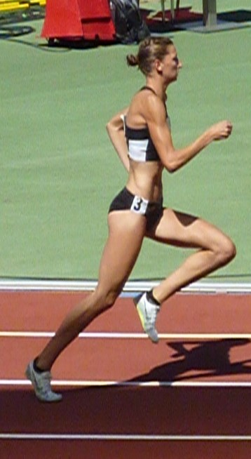 Christina Hering, Deutsche Leichtathletik-Meisterschaften 2015